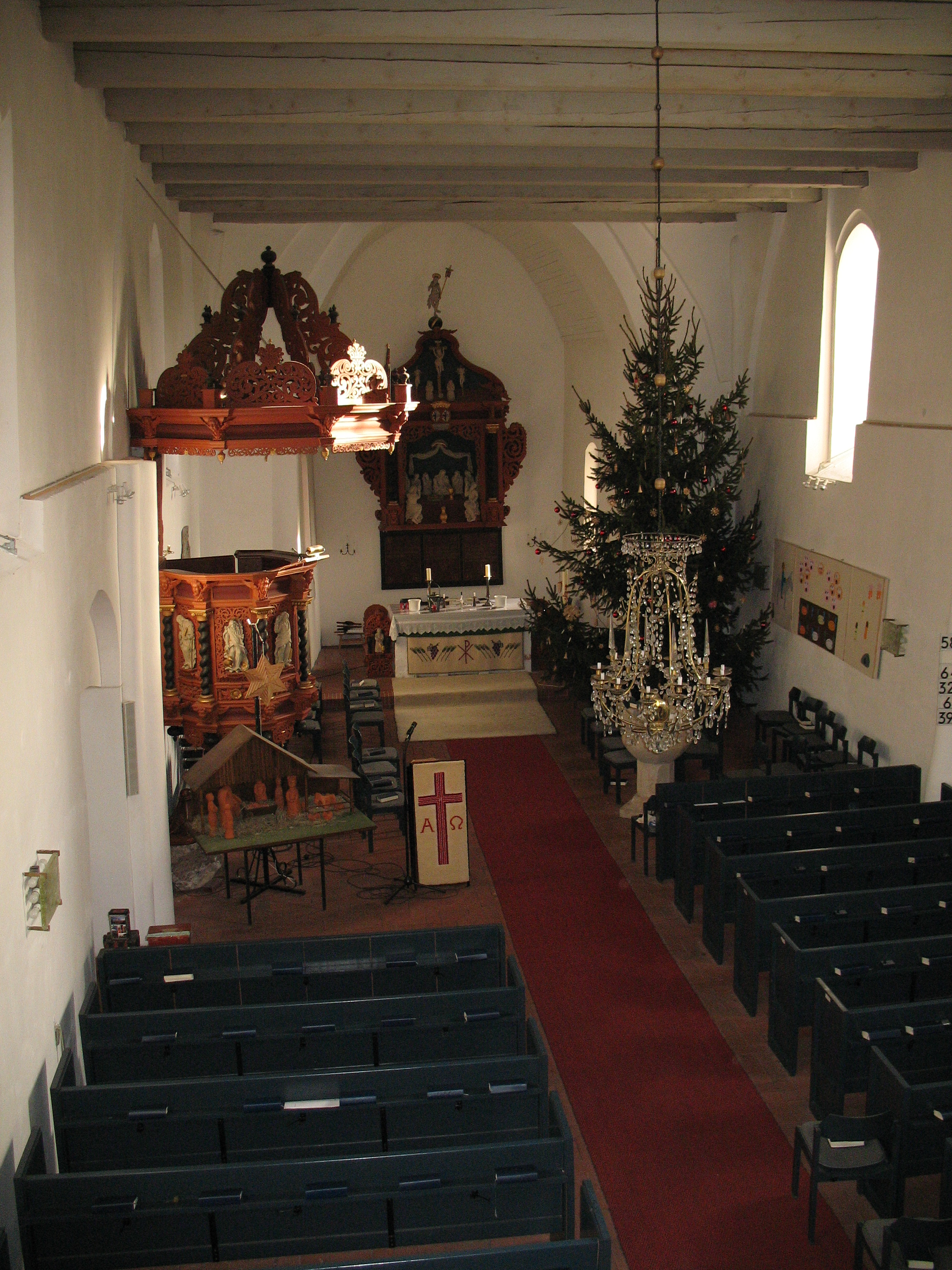 Innenraum der Kirche in Wiesens, Ostfriesland